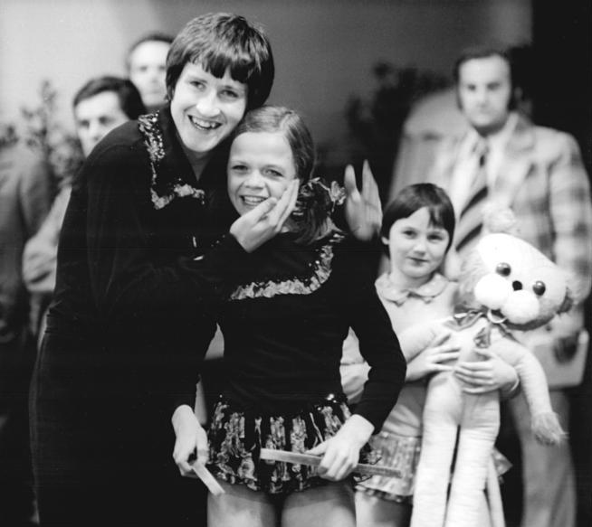 Uwe Bewersdorf, Manuela Mager ADN-ZB Reiche 19.11.76 Berlin: Grund zur Freude haben die 14jährige Manuela Mager und ihr 18jähriger Partner Uwe Bewersdorf. Beim Pokal der Blauen Schwerter erkämpften die Spartakiadesieger von 1974 einen ausgezeichneten zweiten Platz. Als erstes DDR-Paar führten die Dresdner bei der Kür am Abend des 18.11.76 einen technisch perfekten dreifachen Wurfrittberger vor. Siehe dazu auch ADN-Meldung vom 19.11.76.